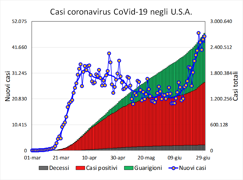 Andamento giornaliero dei casi relativi alla pandemia di COVID-19. Sono evidenziati decessi, guarigioni, casi attivi e nuovi casi giornalieri.